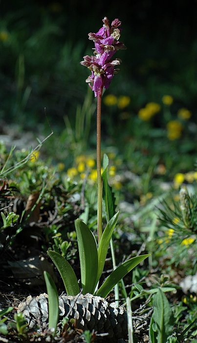 Orchis spitzelii, single plant, Vercors, France